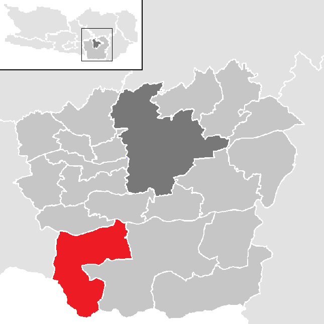 Bezirk Klagenfurt-Land